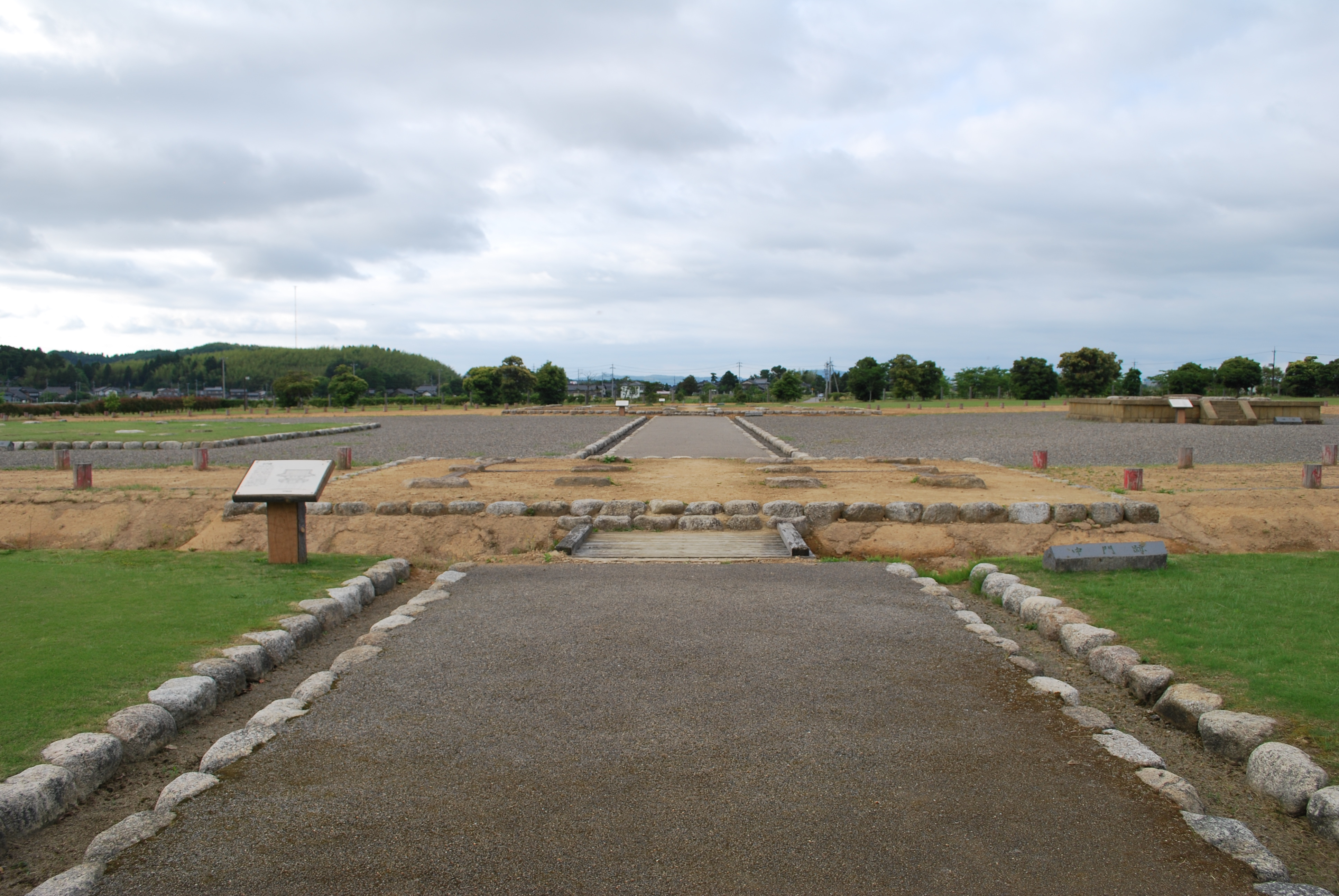 能登国分寺金堂跡